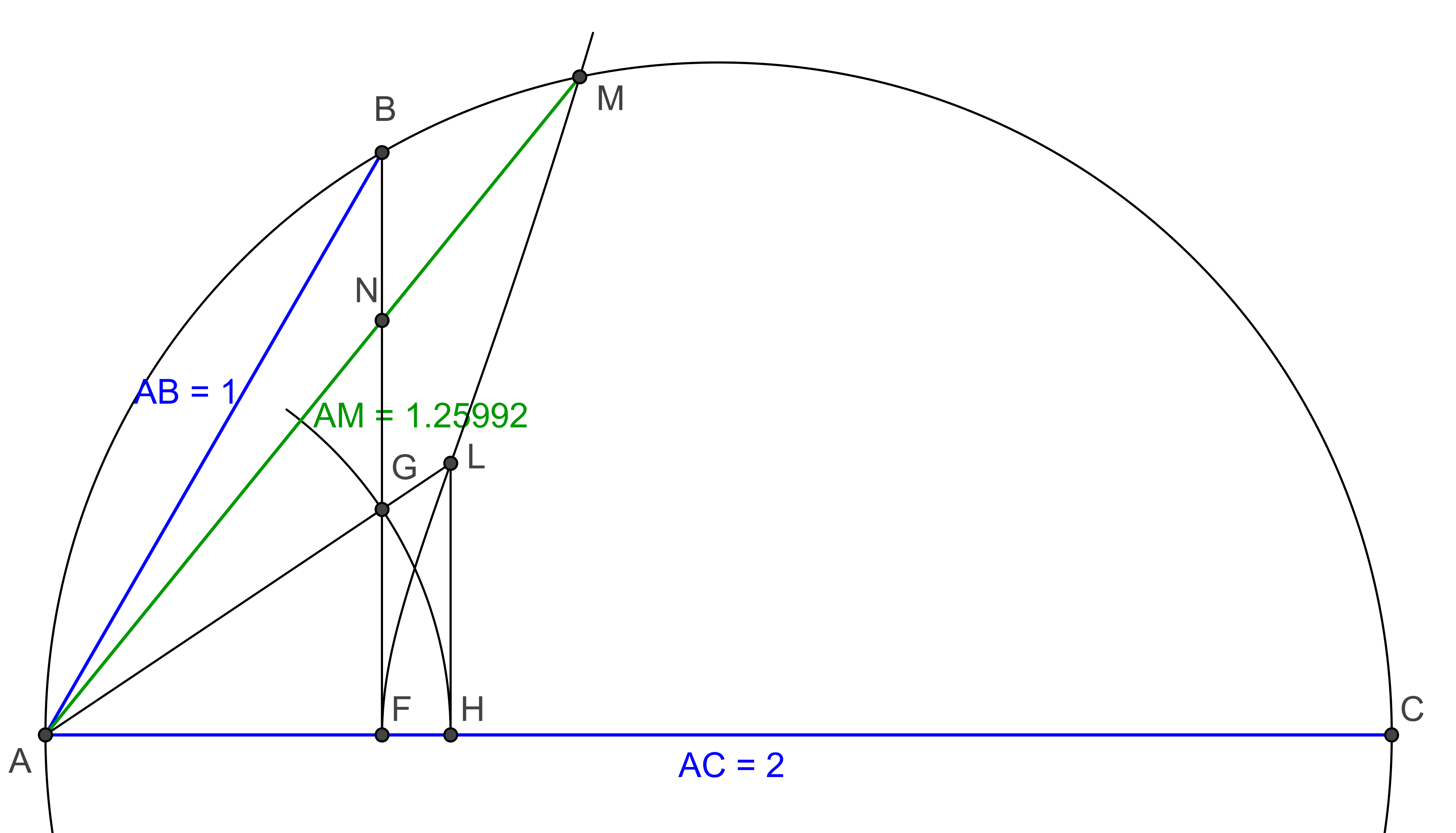 Duplicació del cub